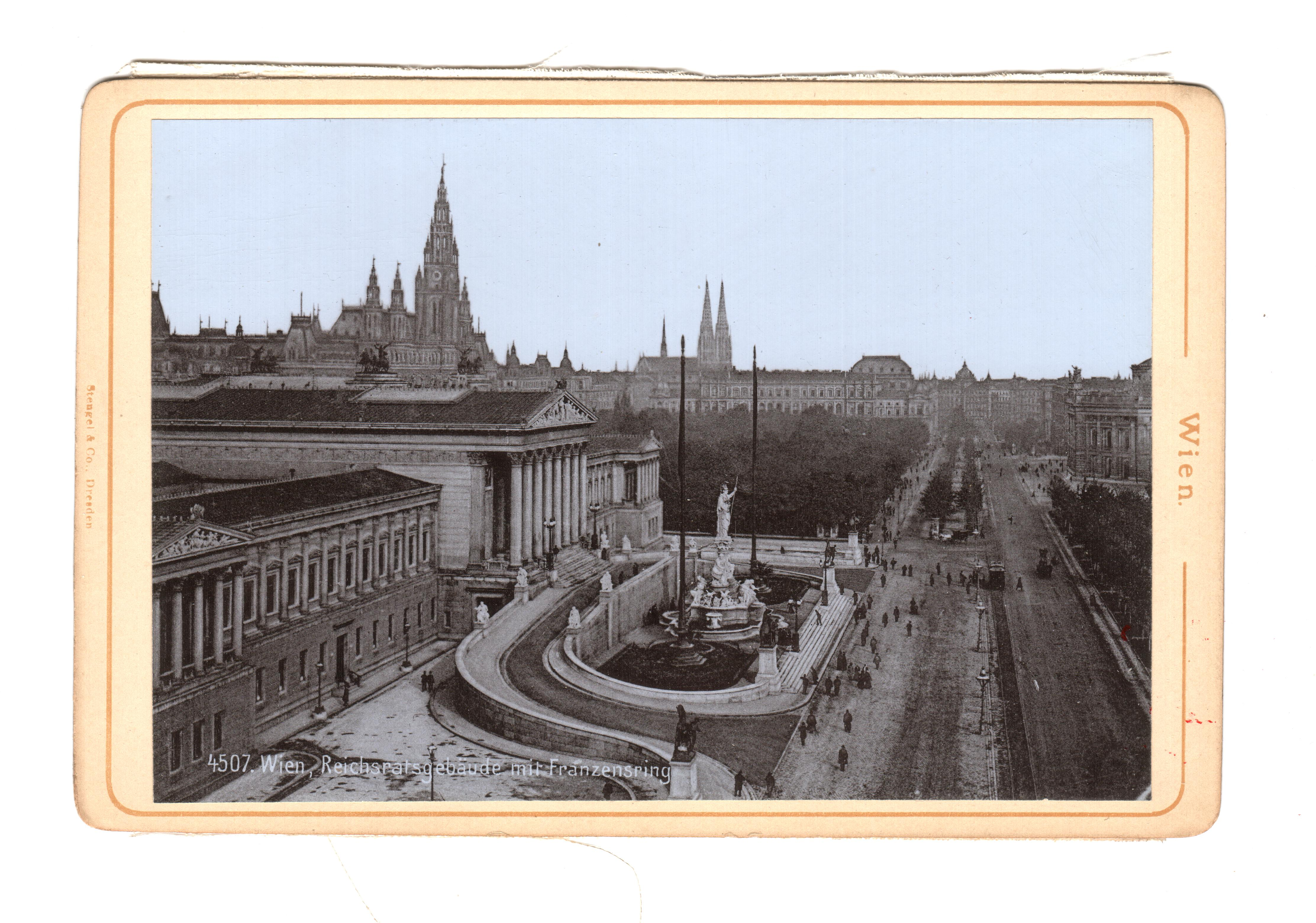 Osztrák-Magyar Monarchia, Bécs. Ismeretlen fényképész. This work is in the public domain in its country of origin and other countries and areas where the copyright term is the author's life plus 70 years or fewer. You must also include a United States public domain tag to indicate why this work is in the public domain in the United States. Note that a few countries have copyright terms longer than 70 years: Mexico has 100 years, Jamaica has 95 years, Colombia has 80 years, and Guatemala and Samoa have 75 years. This image may not be in the public domain in these countries, which moreover do not implement the rule of the shorter term. Côte d'Ivoire has a general copyright term of 99 years and Honduras has 75 years, but they do implement the rule of the shorter term. Copyright may extend on works created by French who died for France in World War II (more information), Russians who served in the Eastern Front of World War II (known as the Great Patriotic War in Russia) and posthumously rehabilitated victims of Soviet repressions (more information). This file has been identified as being free of known restrictions under copyright law, including all related and neighboring rights. Fényképalbum 16 fényképéből. A fényképek mérete 9,5 cm x 14,5 cm. ©© Megjelent Creative Commons alatt a Metapolisz sorozatban. A Metapolisz sorozat valamennyi képe és filmje Creative Commons alatti valamint kereskedelmi - for profit - célra is felhasználható. Ajánlott hivatkozás: Derzsi Elekes Andor: Metapolisz DVD line ©© Published under Creative Commons in the Metapolisz DVD line. All of the photos and vids in the Metapolisz DVD line are under Creative Commons and can be used even for commercial – for profit – purposes. Recommended Citation Derzsi Elekes Andor: Metapolisz DVD line